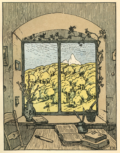 Farblithografie